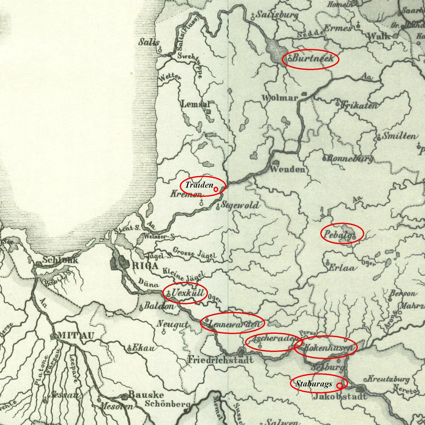 Die Handlungsplätze des Epos Lāčplēsis: Ascheraden (lett. Aizkraukle), Burtneck (Burtnieki), Uexküll bzw. Üxküll (Ikšķīle), Kokenhusen (Koknese), Lennewarden (Lielvārde), Pebalg (Piebalga), Rīga (Riga), Staburags und Traiden (Turaida). Die Kangarberge (Kangaru kalni oder Lilie kangari) liegen auf halber Strecke zwischen Segewold (Sigulda) und Friedrichstadt (Jaunjelgava). Ausschnitt aus der Karte Lettisches Sprachgebiet 1884 nach Bielenstein.jpg